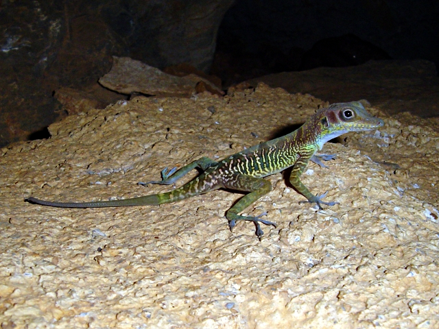 Anolis bartschi Este lagarto es endémico de Cuba, má concretamente, sólo se puede encontrar en la provincia de Pinar del Río, en las regiones montañosas de Sierra del Rosario y Sierra de los Órganos. Aparece en cuevas y en zonas de cantos rodados y rara vez trepa a la vegetación, sino que prefiere esconderse entre las piedras en caso de peligro. El dorso y los costados son de color verdoso claro con tintes violáceos; los costados están surcados por barras verticales irregulares de color amarillo azufre con los bordes oscuros. Detrás del ojo luce una gran marca azulada o violácea. Las extremidades son oliváceas con las pies azules. Los dedos se ensanchan en los extremos y están todos dotados de fuertes uñas. Mide entre 6 y 7 centímetros, sin contar la larga cola. No muestra un comportamiento especialmente territorial, y pueden encontrarse individuos de ambos sexos viviendo juntos en la misma cueva. Incluso las hembras depositan los huevos en un mismo nido comunal. Son más activos por la mañana y al caer la tarde, siendo muy difícil encontrarlos a mediodía. Se alimentan de diversos artrópodos, en especial insectos.